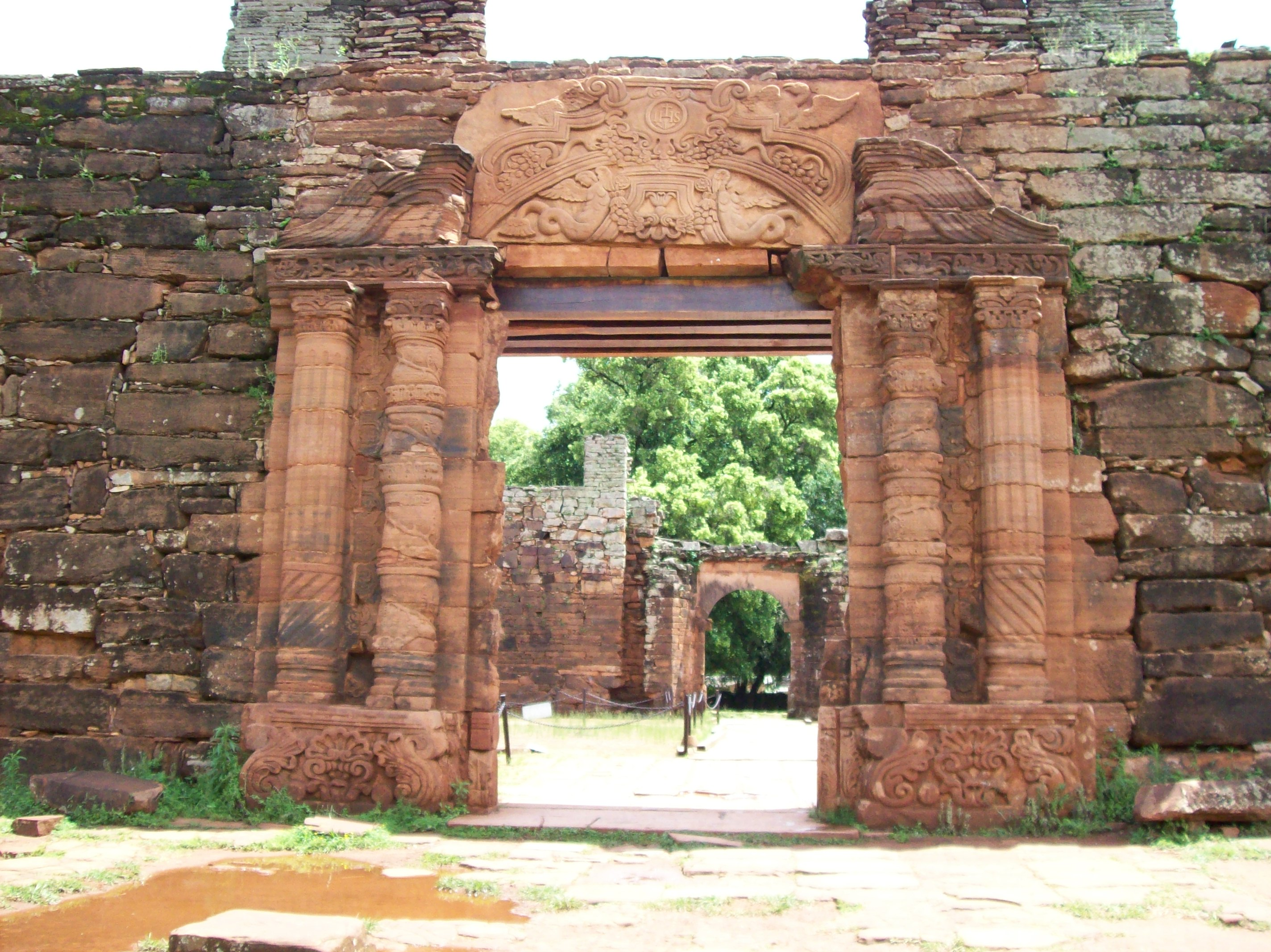 Ruinas de San Ignacio Miní